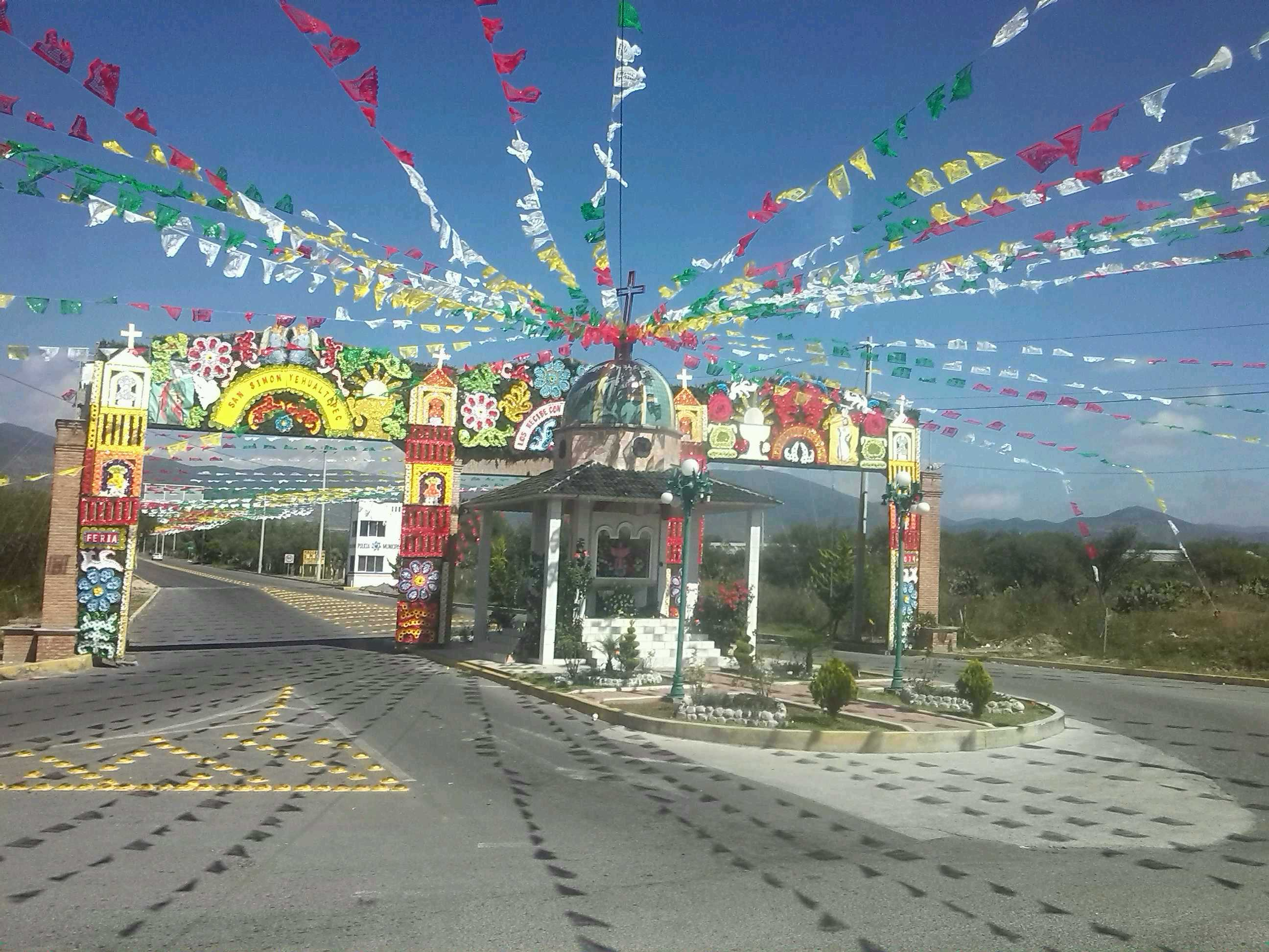 Entrada a San Simón Yehualtepec, Puebla